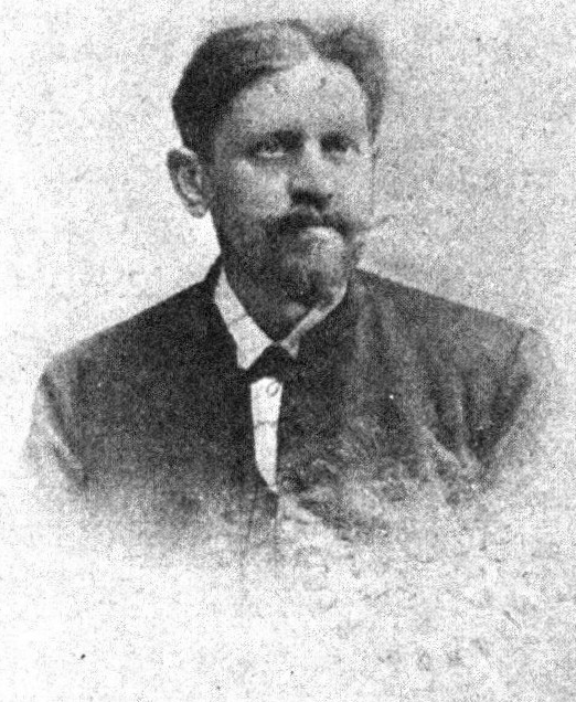 Österreichischer Politiker, Reichsratswahl 1907, Name siehe Dateiname